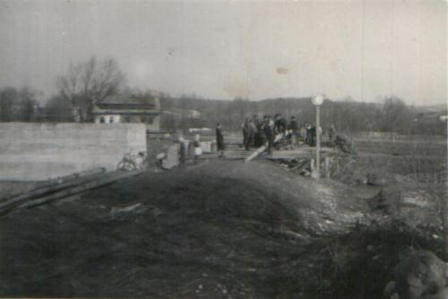 Budowa mostu w Długopolu na Podhalu